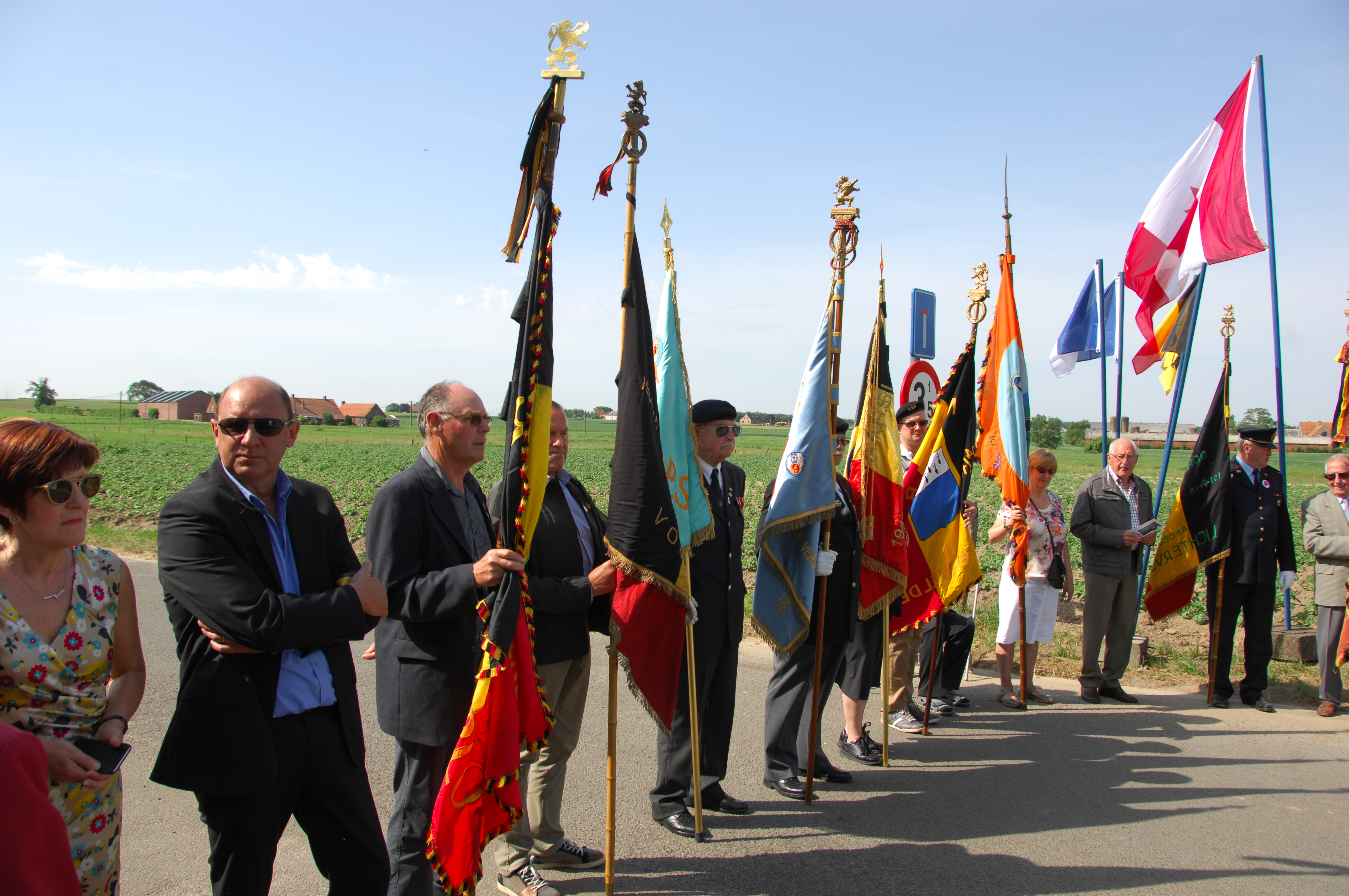 Lichtervelde Lancaster Monument inhuldiging